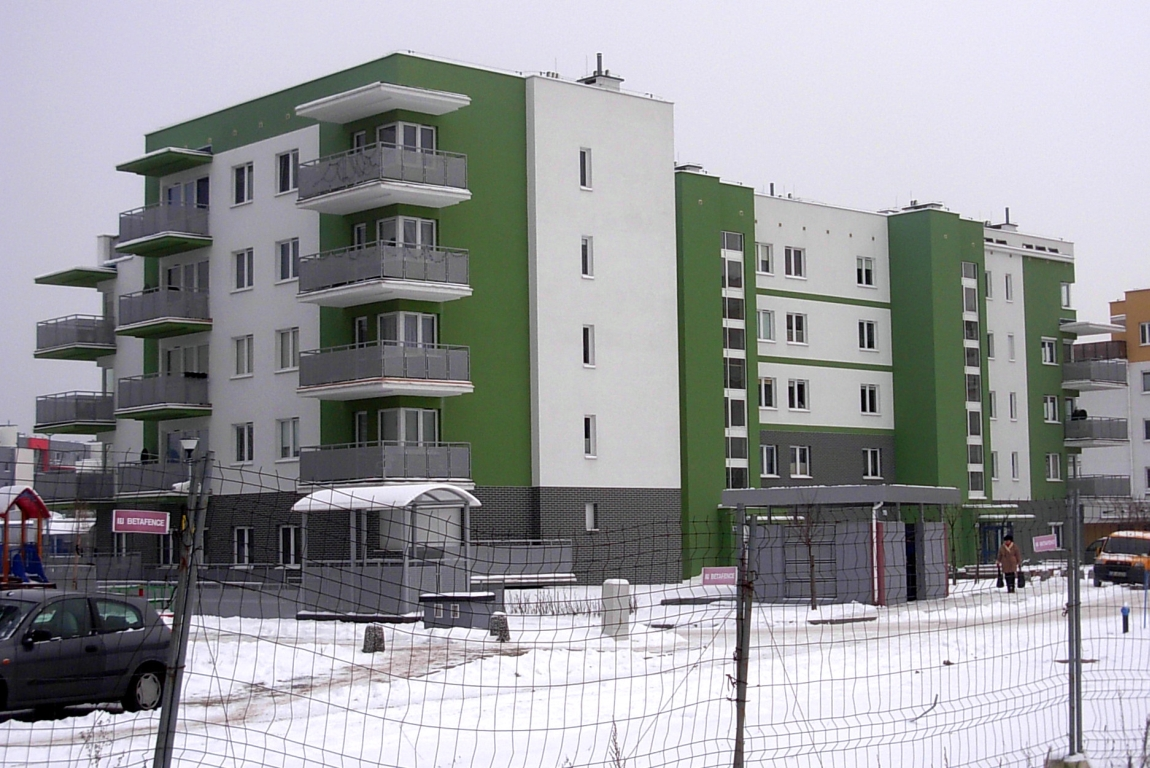 Nowa zabudowa na osiedlu Wyżyny w Bydgoszczy